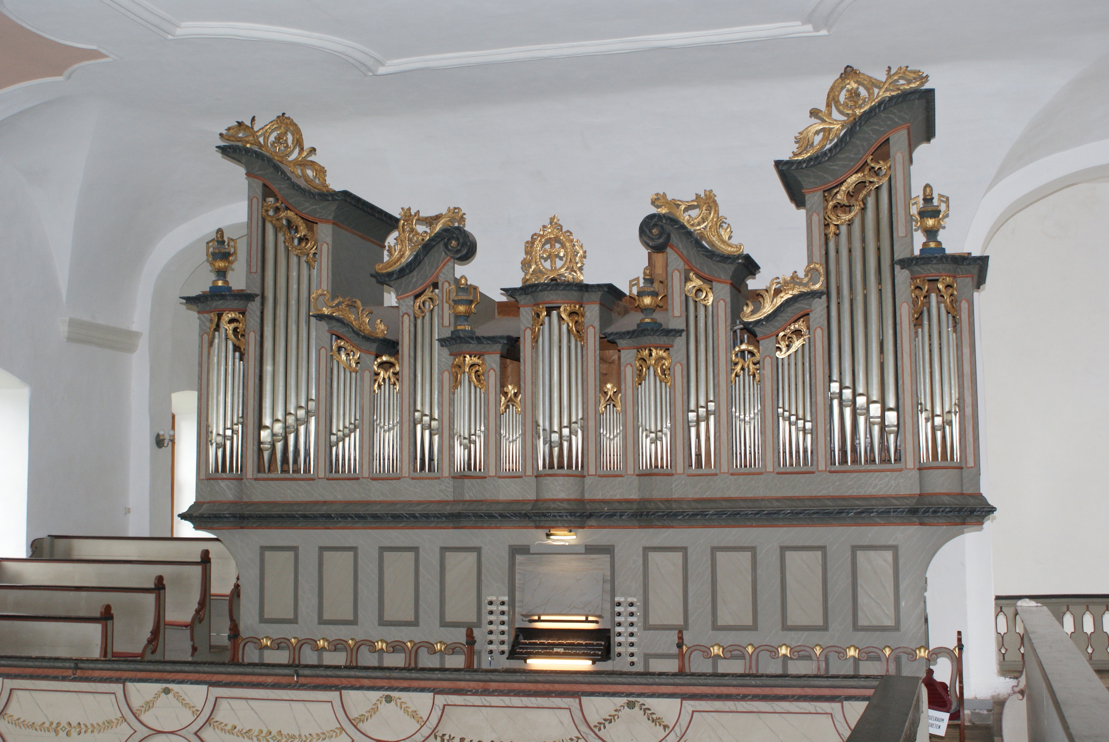 Bekrönung der Orgel in der Evangelischen Kirche in Nieder-Moos, Hessen, Deutschland